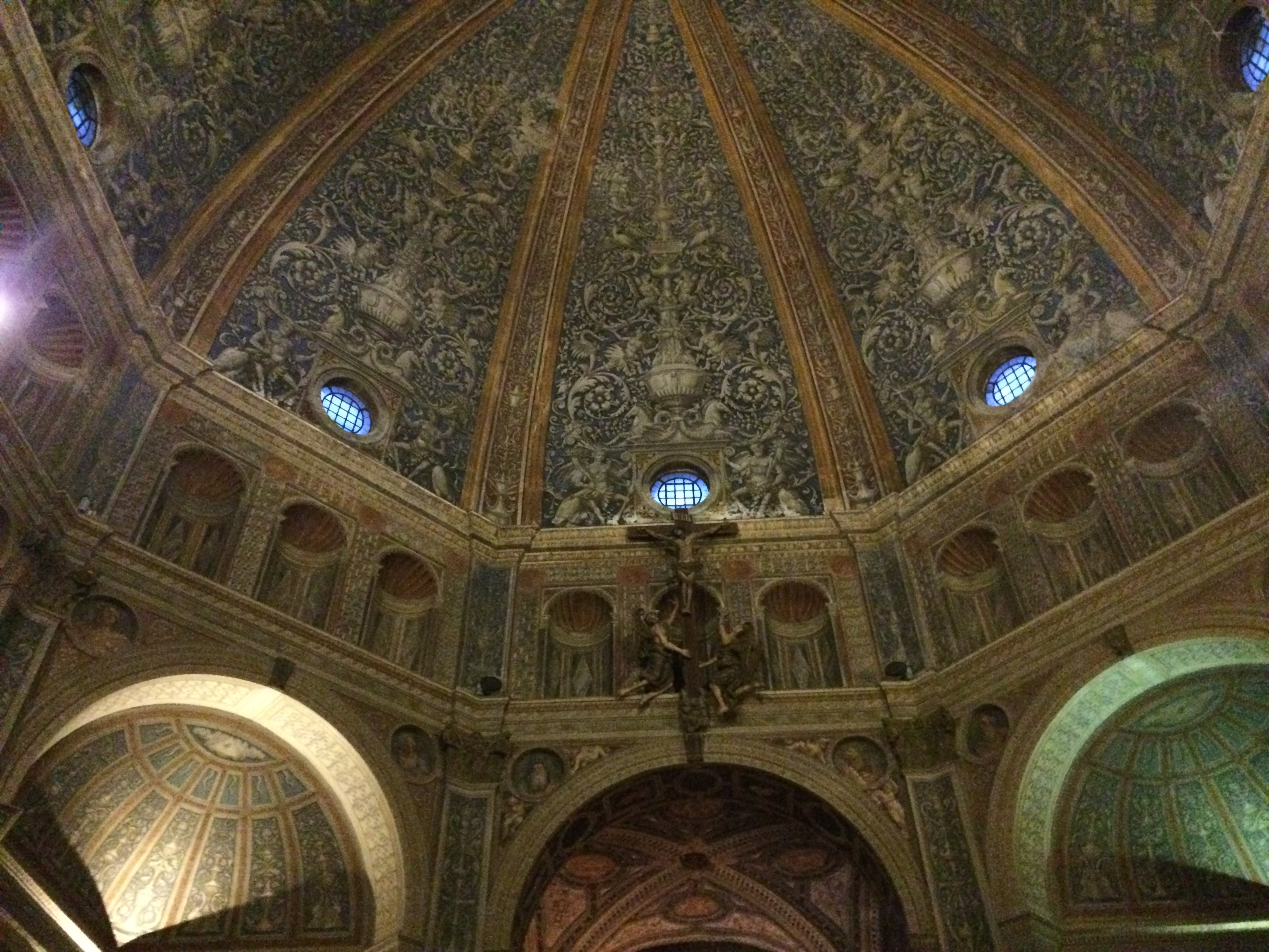 Volta principale della basilica di San Magno